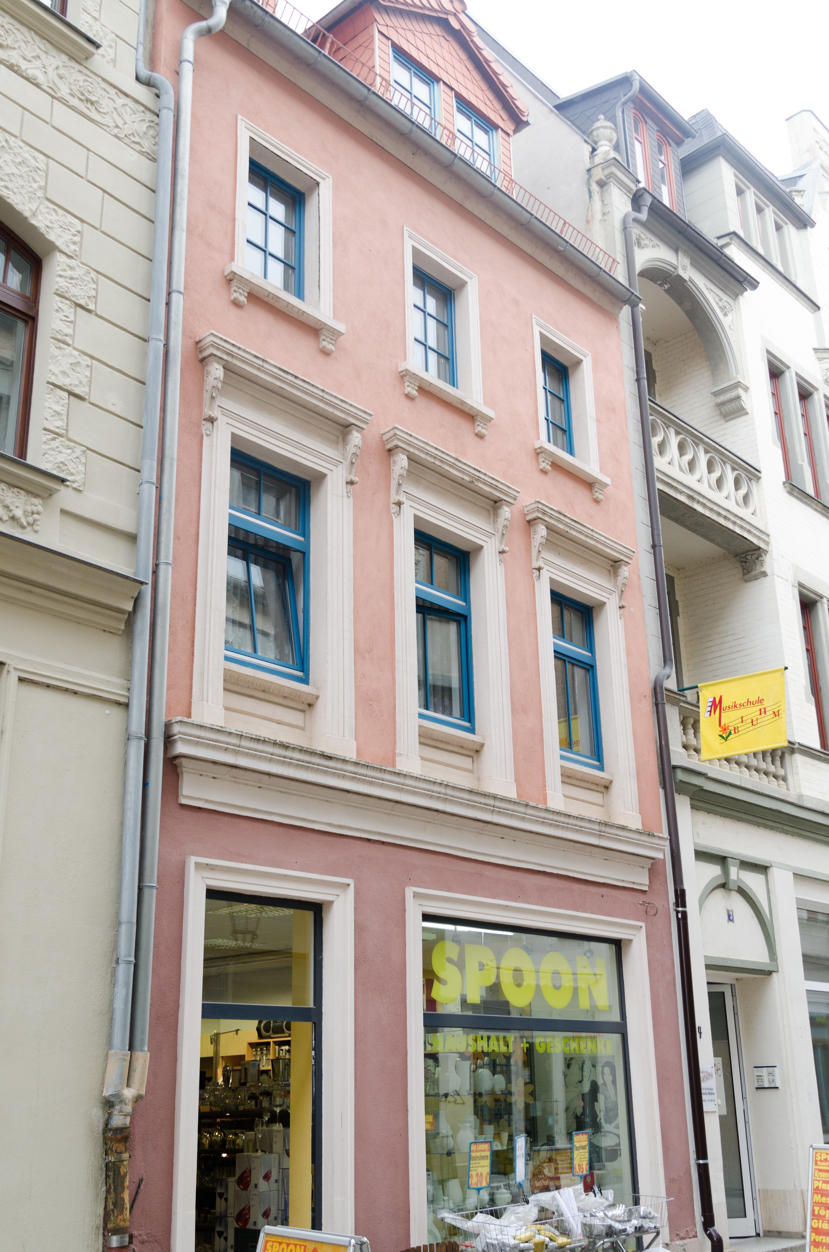 Zeitz, Kramerstraße 4